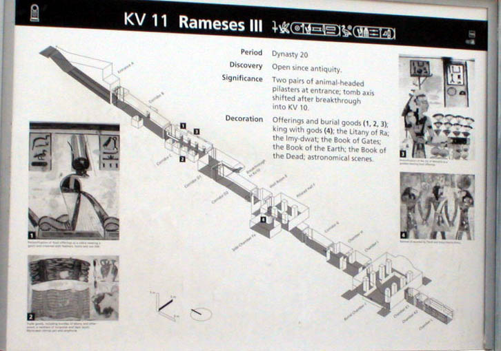 Fotografija table pred Ramzesovo grobnico s sheme grobnice - Ramzes III.